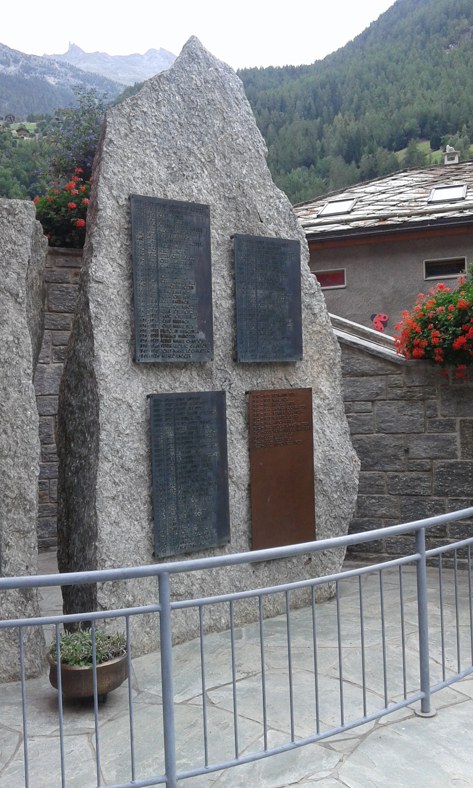 Das Bergführerdenkmal, das sich auf dem Kirchplatz von St. Niklaus Dorf befindet, konnte am 4. Juni 1995 eingeweiht werden.